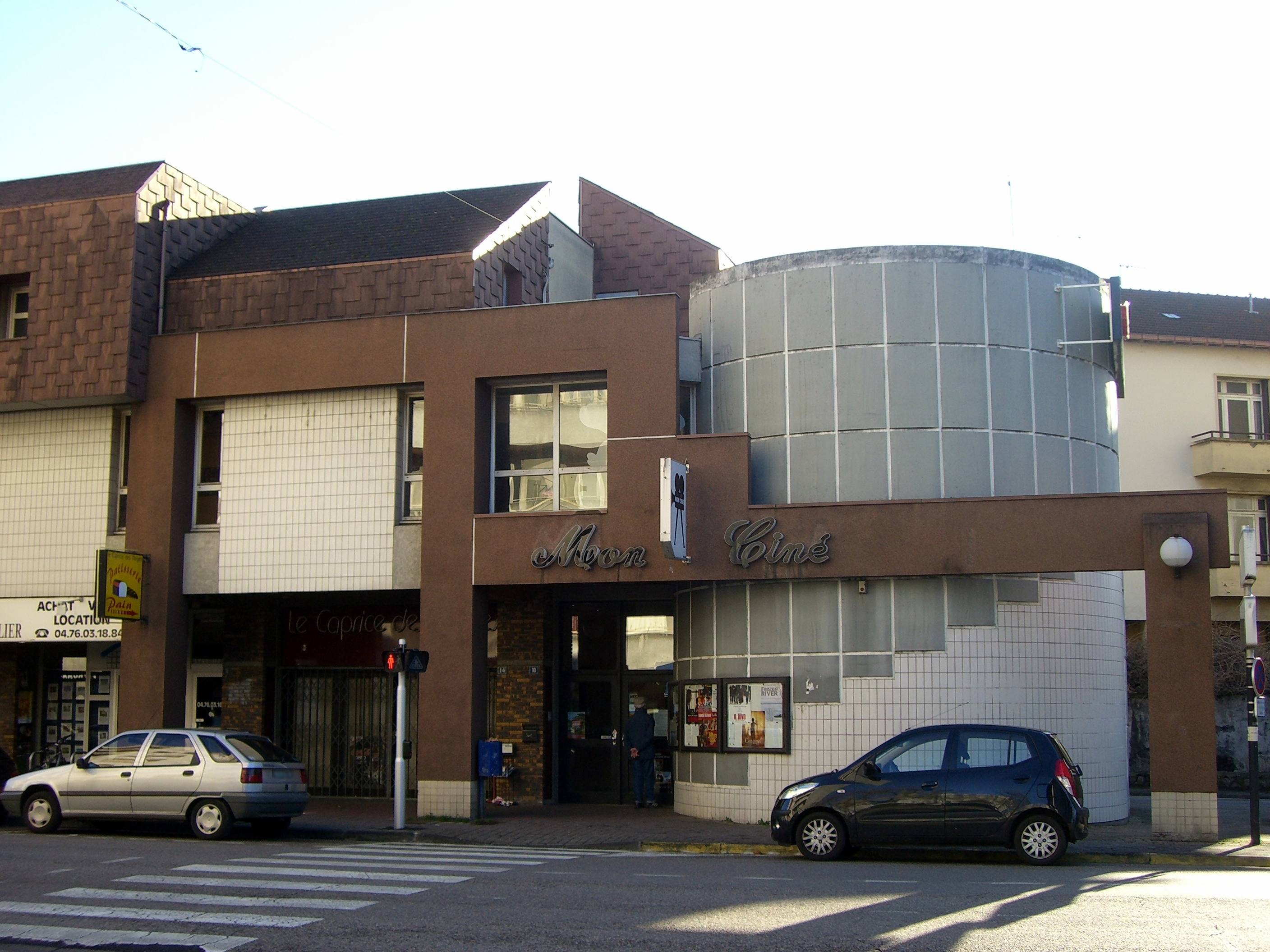 Le cinéma Mon Ciné à Saint-Martin-d'Hères.